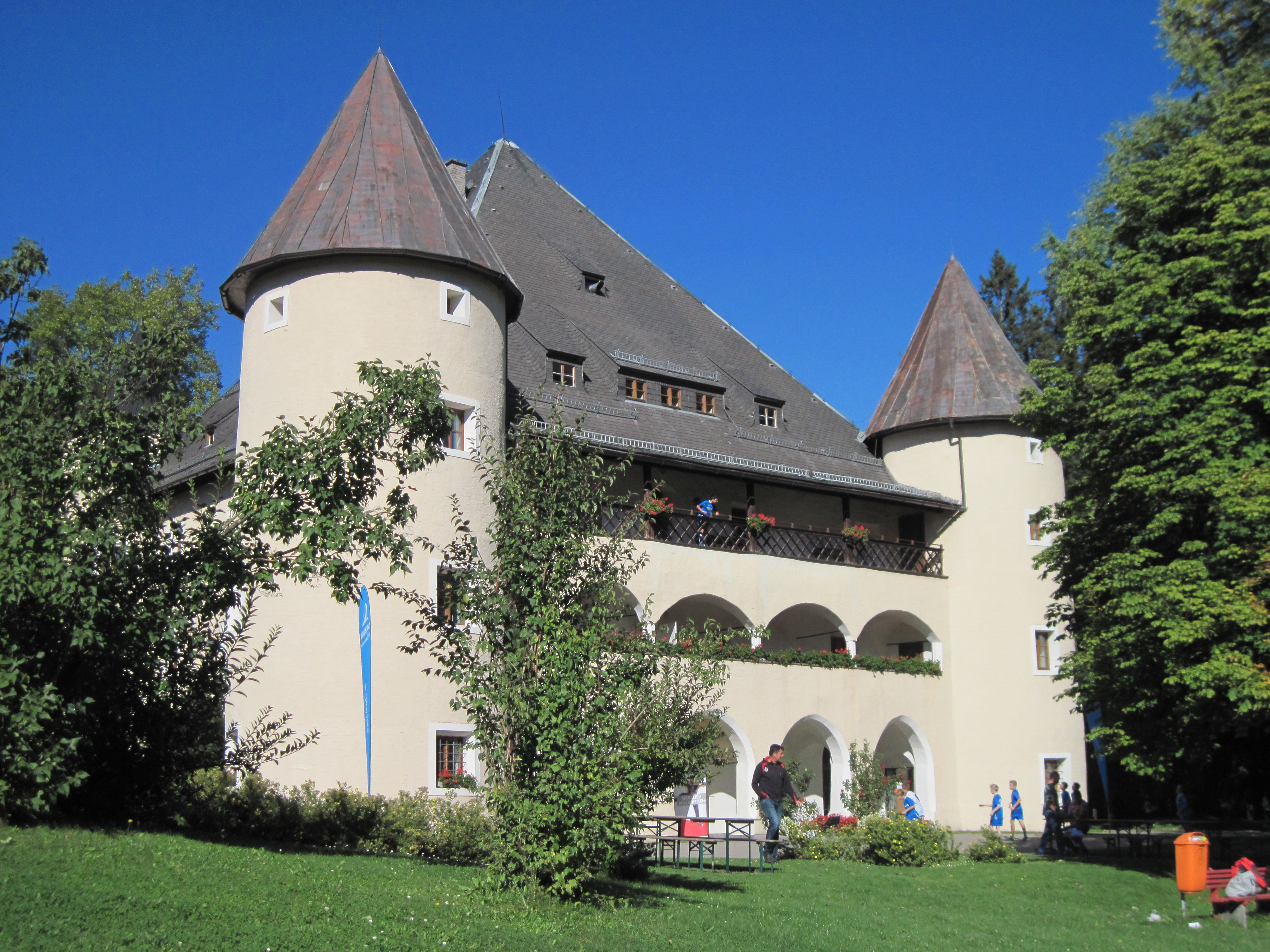 Ansitz, Schloss Tandalier